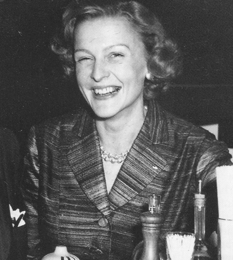 Maj-Britt Frati (född Håkansson) på restaurangen "Tre Remmare"